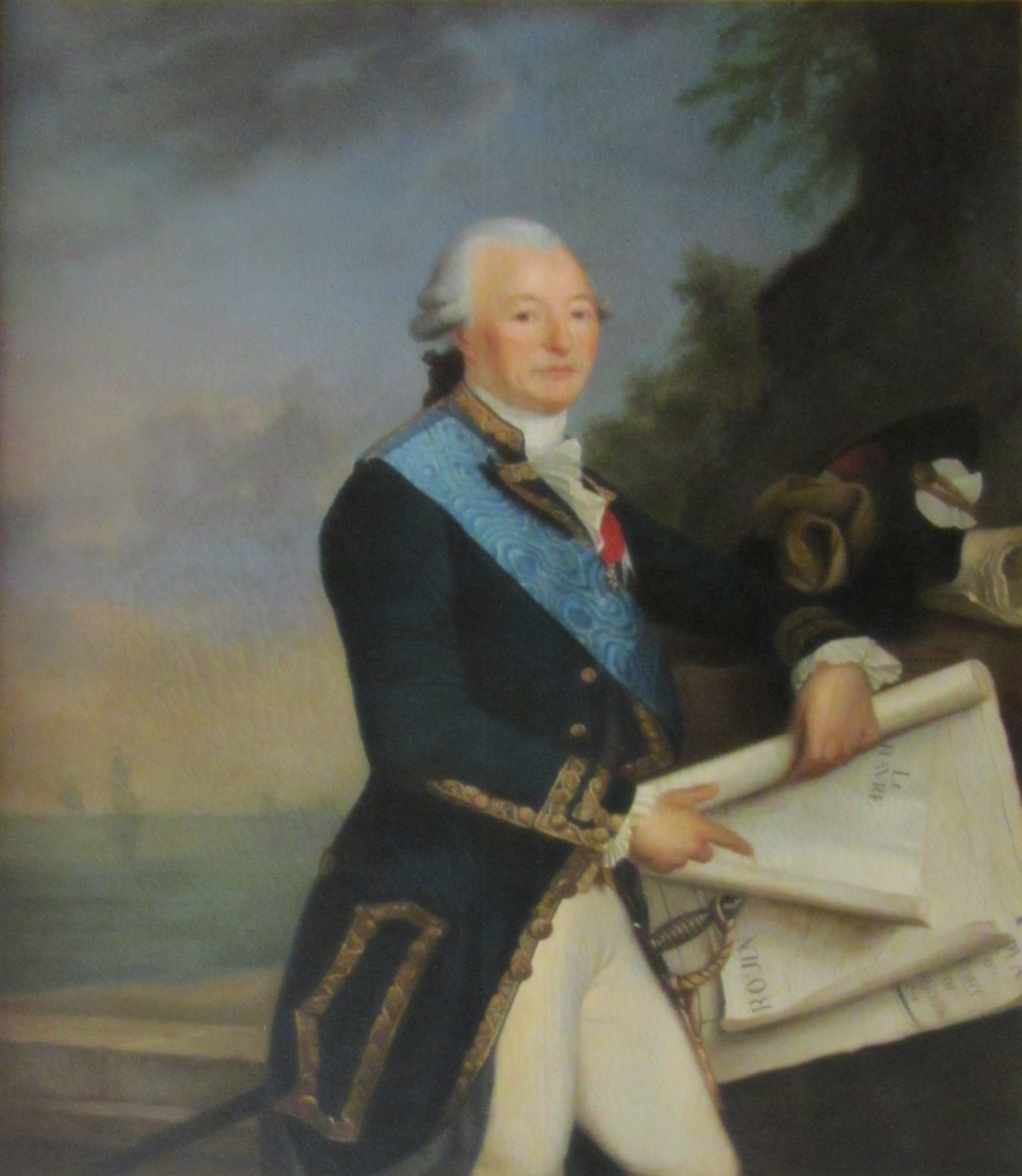 Château de Tocqueville - Portrait de François Henri d'Harcourt (1726-1802) This document was produced using the Canon PowerShot SX230 HS lent by Wikimedia France. This building is en partie classé, en partie inscrit au titre des Monuments Historiques. .